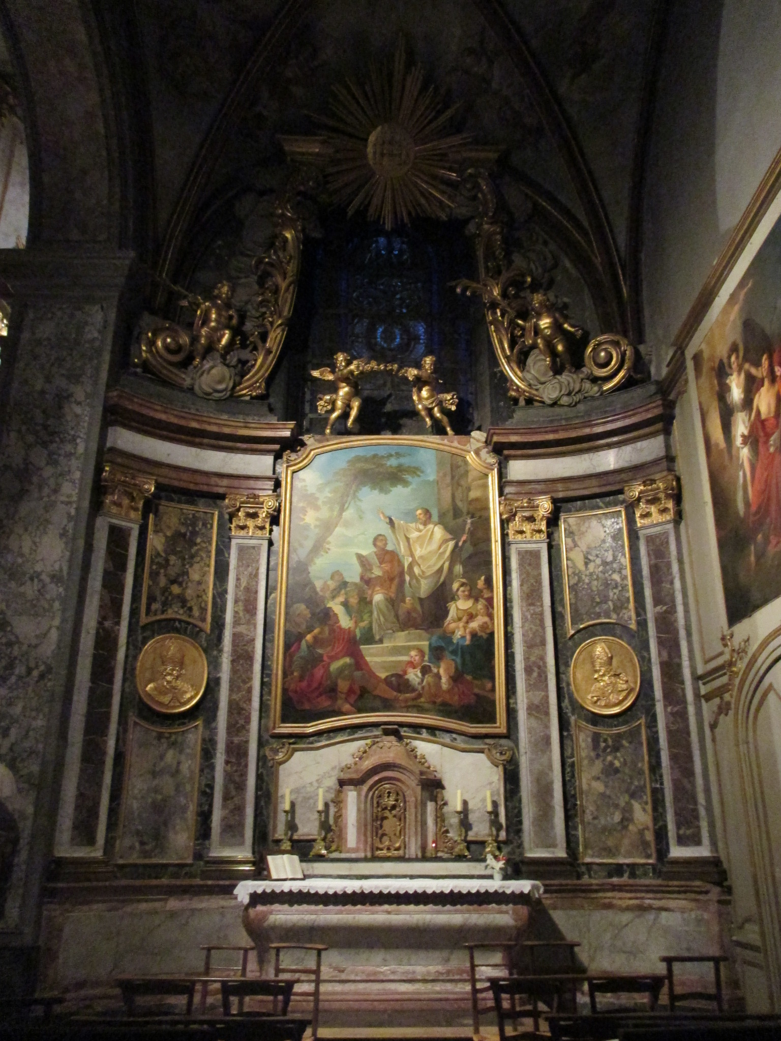 Ferréol et Ferjeux Besançon , église sainte Jean de Besançon